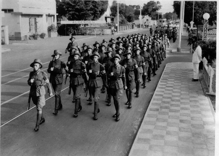 foto. Militairen tijdens de Niau (Nederlandsch Indische Athletiek Unie) wandelmars, Soerabaja